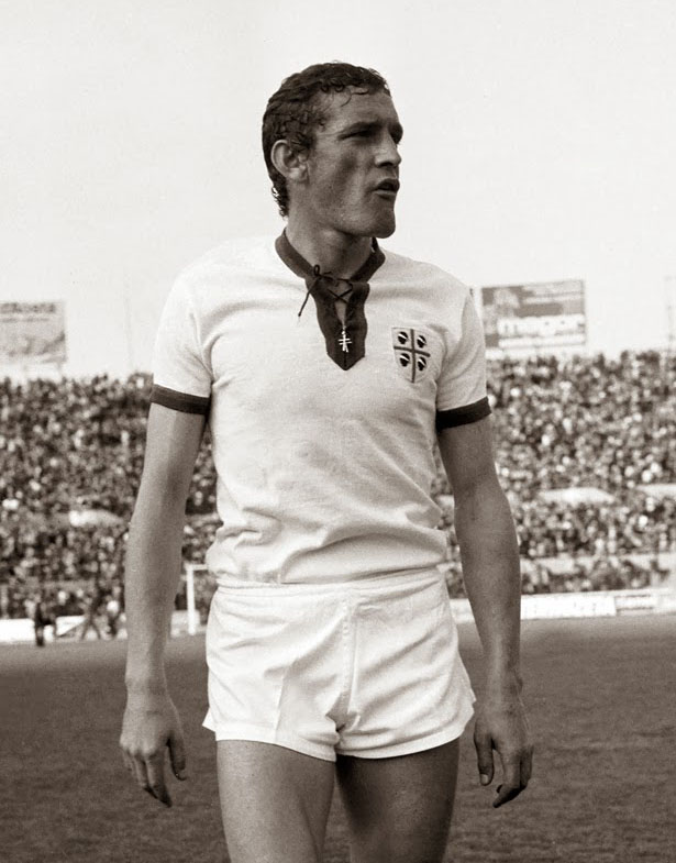 Il calciatore italiano Luigi "Gigi" Riva al Cagliari nella stagione 1969-70, quella dello storico scudetto del club sardo – primo successo assoluto, nella storia del campionato italiano di calcio, per una squadra del Mezzogiorno –; nell'immagine Riva indossa la seconda divisa dell'epoca del Cagliari, bianca con bordini rossoblù, spesso utilizzata in quell'annata per ragioni scaramantiche.